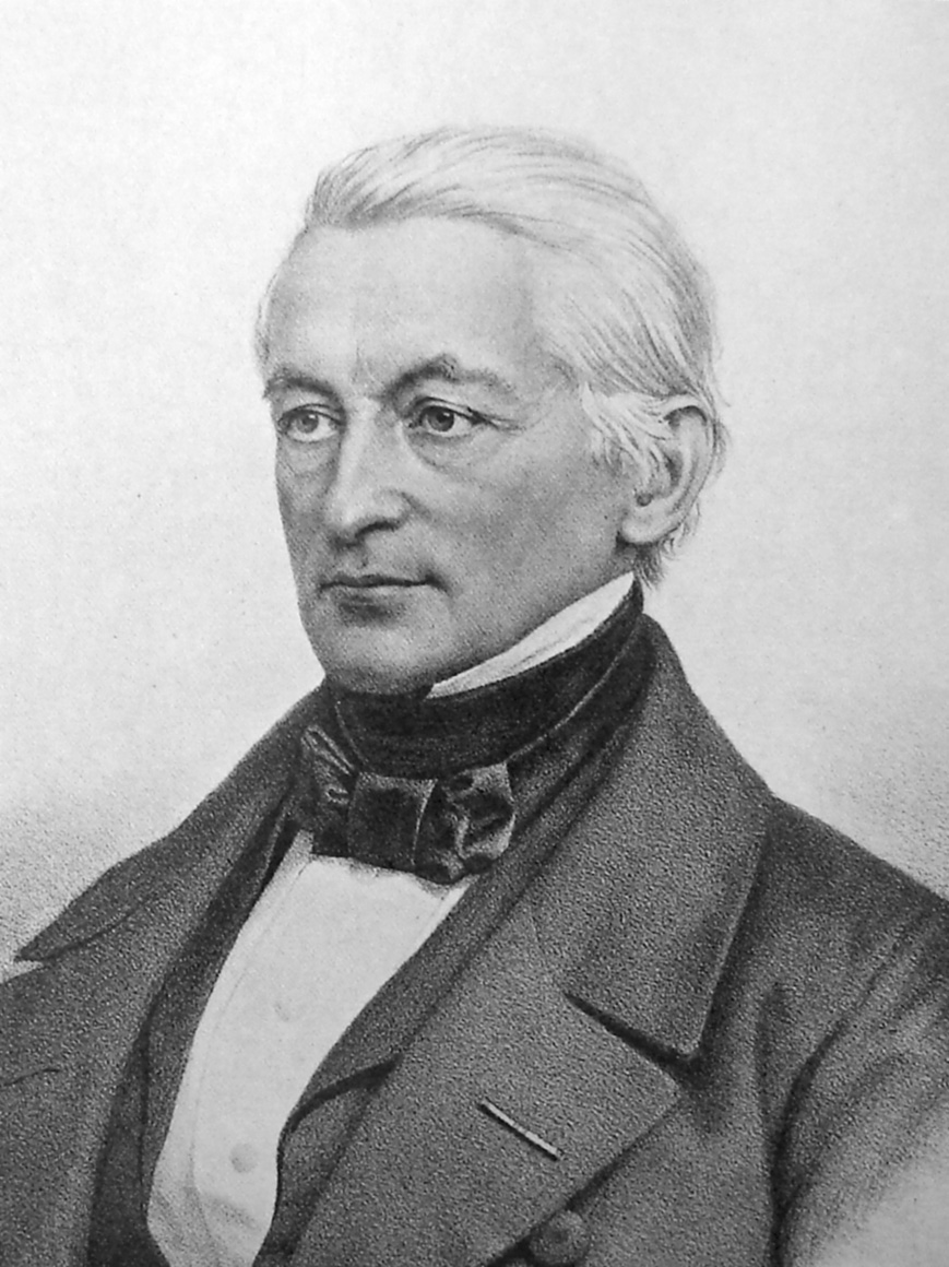 Henrik Nicolai Clausen (1793-1877) var en dansk teolog og politiker.